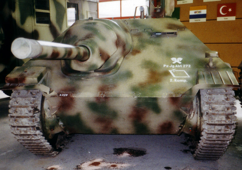 Jagdpanzer 38 Hetzer (Ausgestellt im Panzermuseum Munster.)